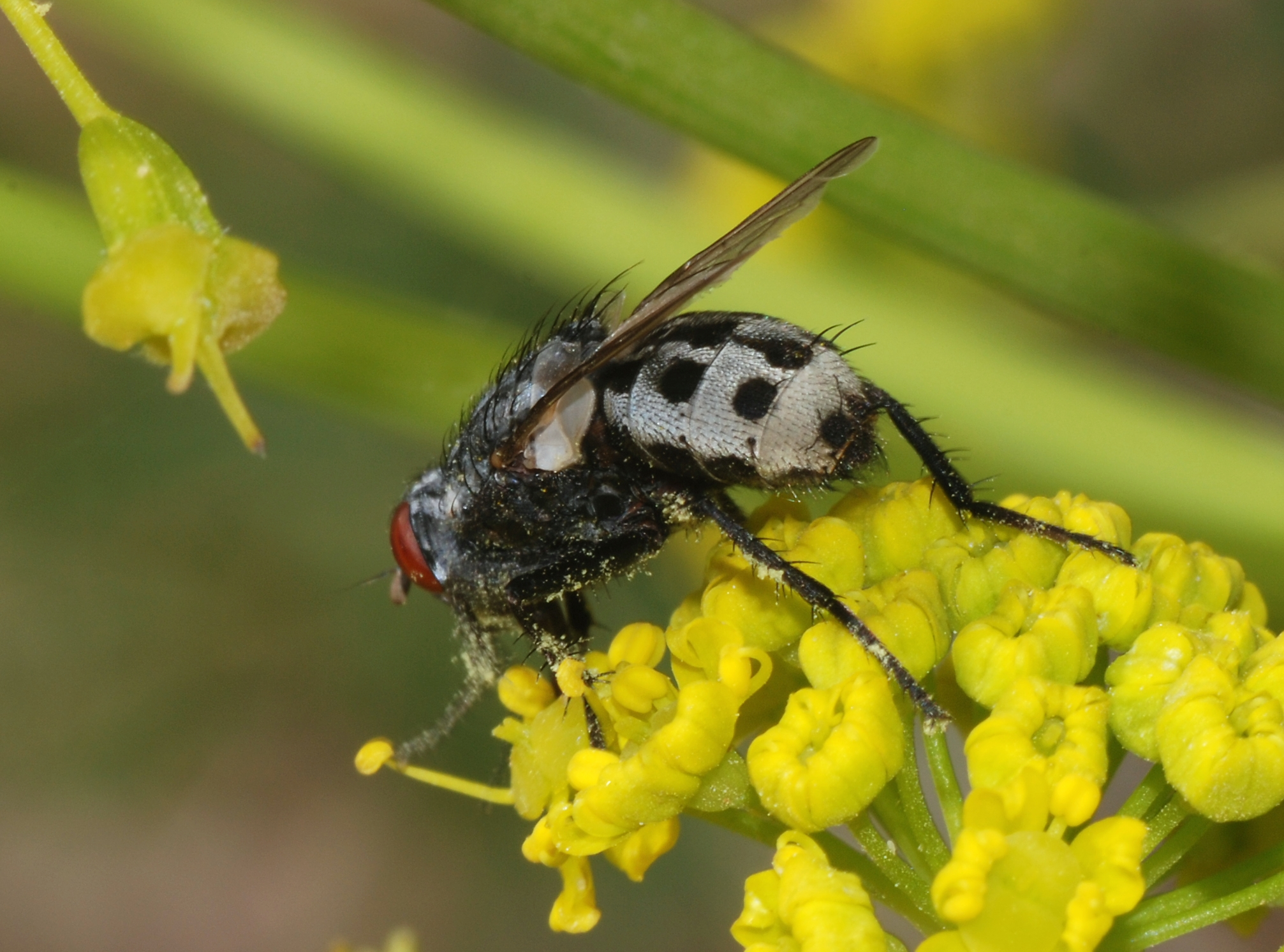 Wahlfahrtia magnifica